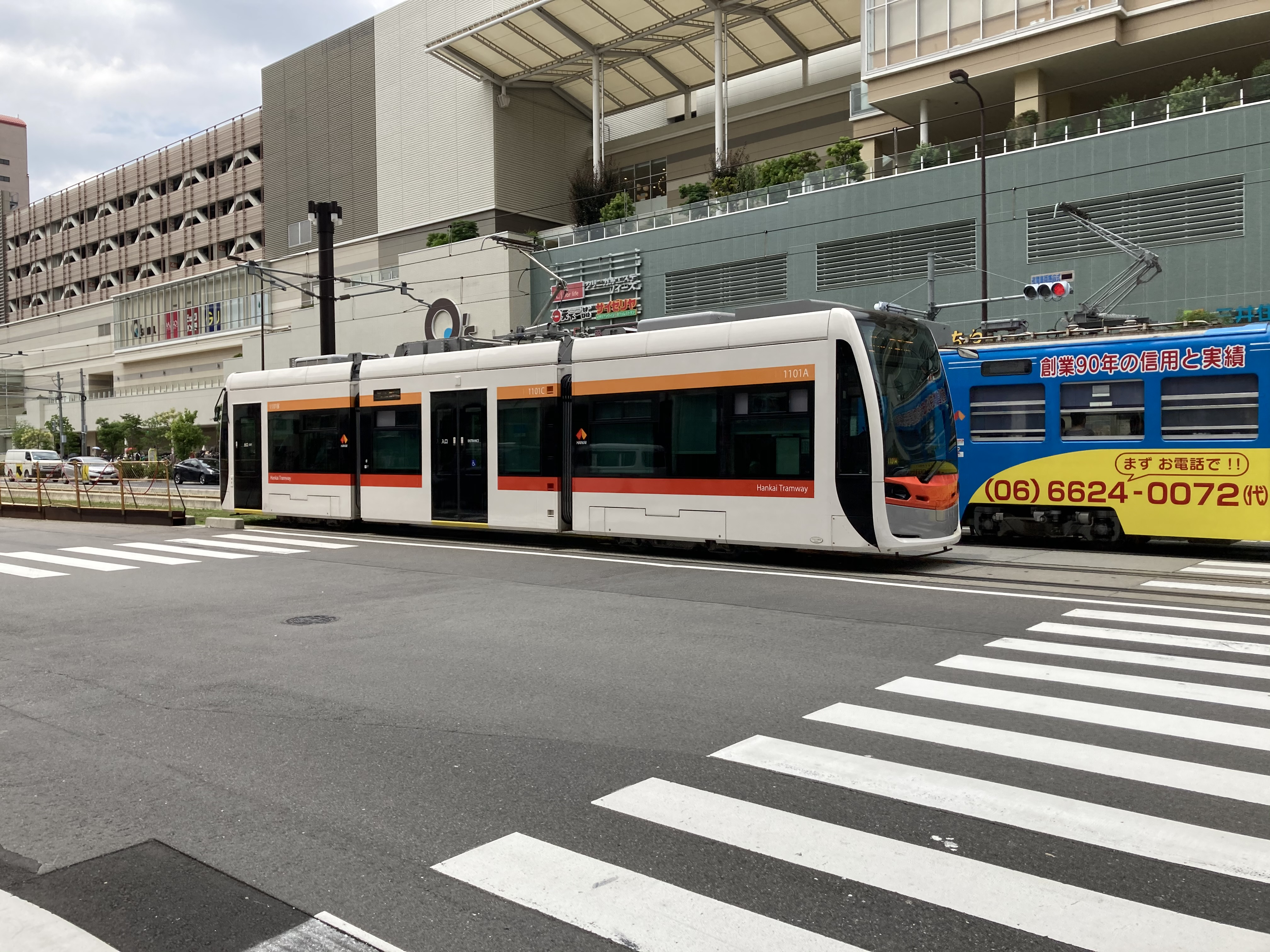 浜寺駅前に向かう1101形